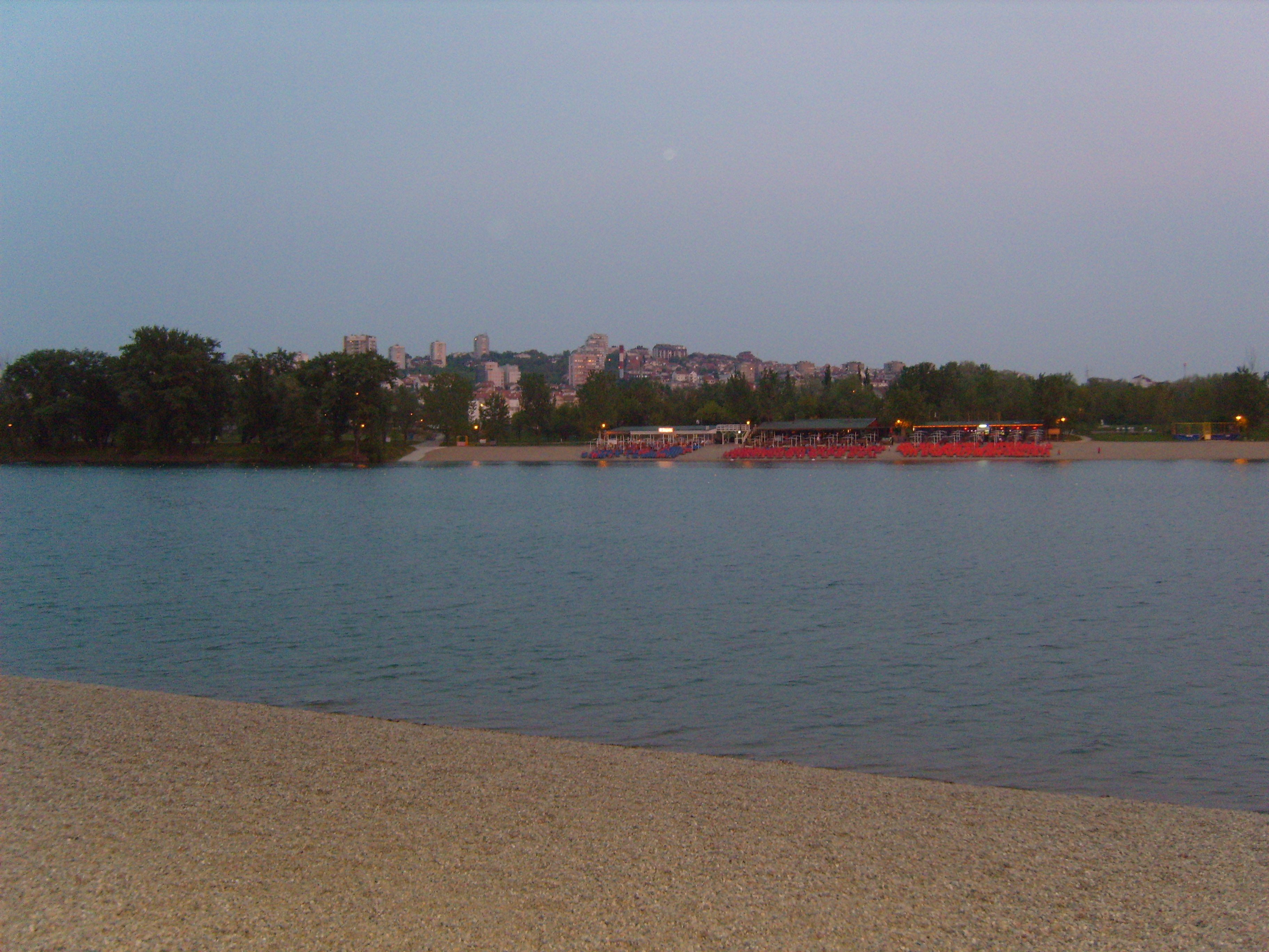 Banovo Brdo from Ada Ciganlija (2008-04-14)